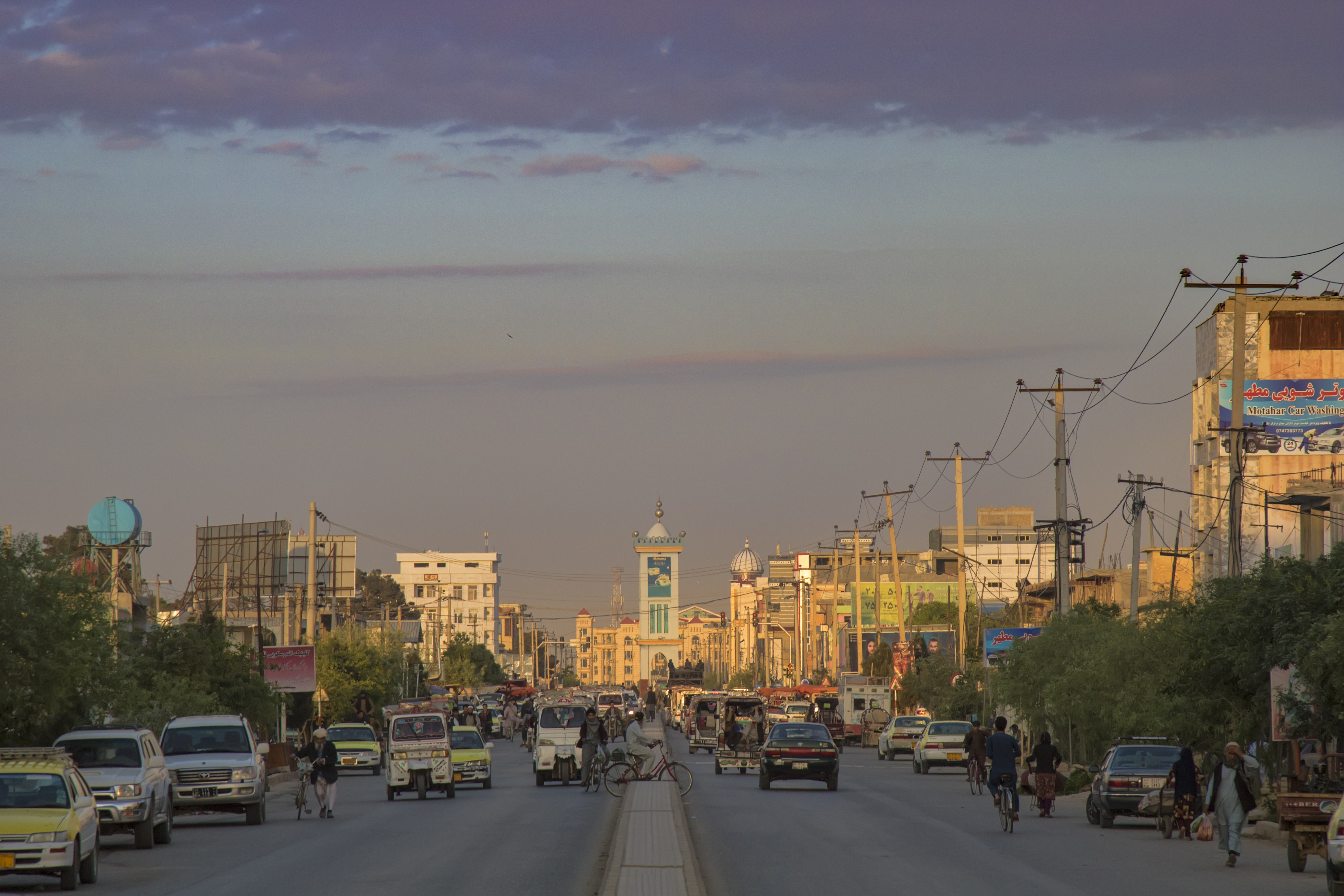 یکی از خیابان های مرکز شهر مزارشریف